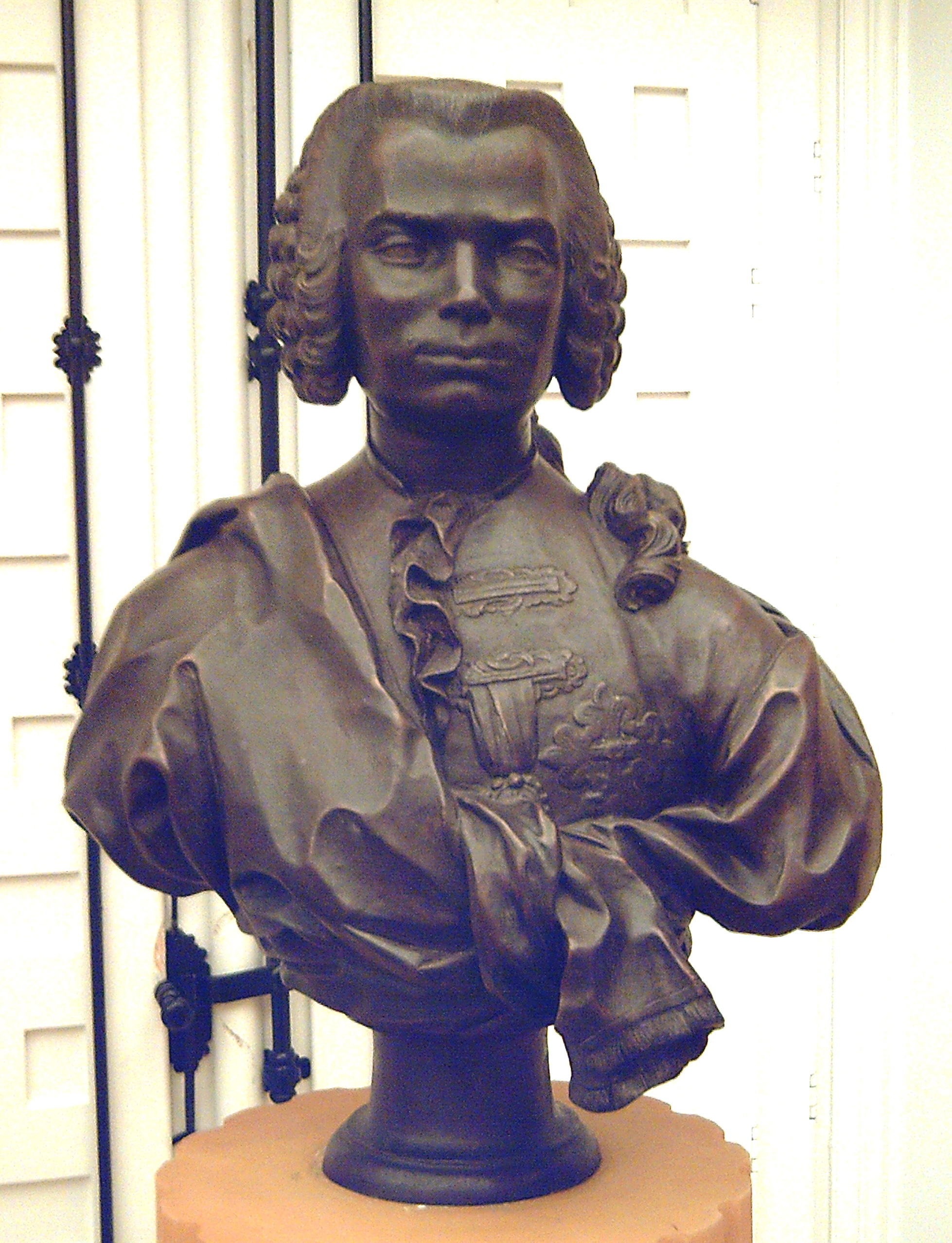 Depicted person: Carlo Broschi, Farinelli (1705–1782).